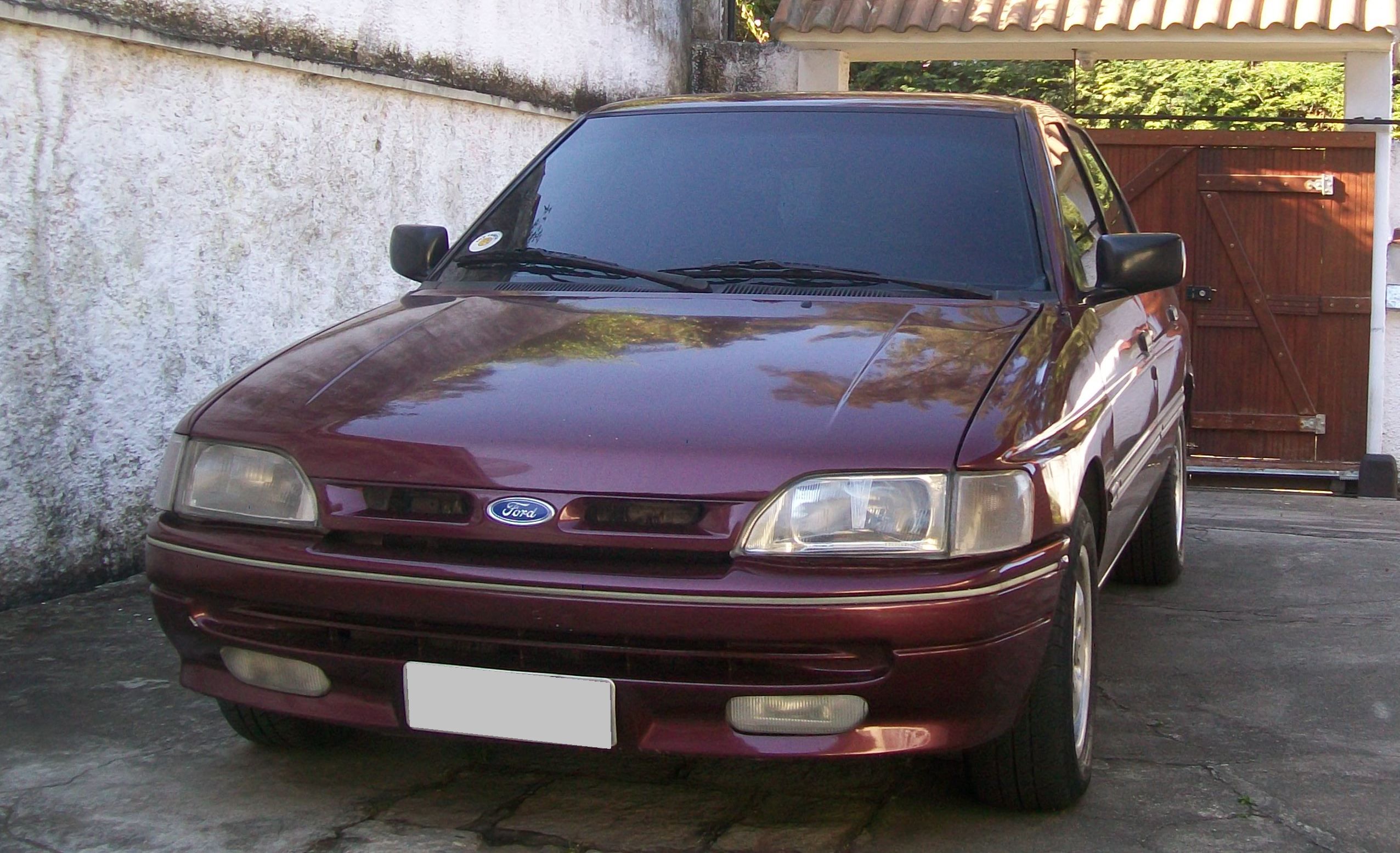 Ford Verona 1.8 GLX 1994